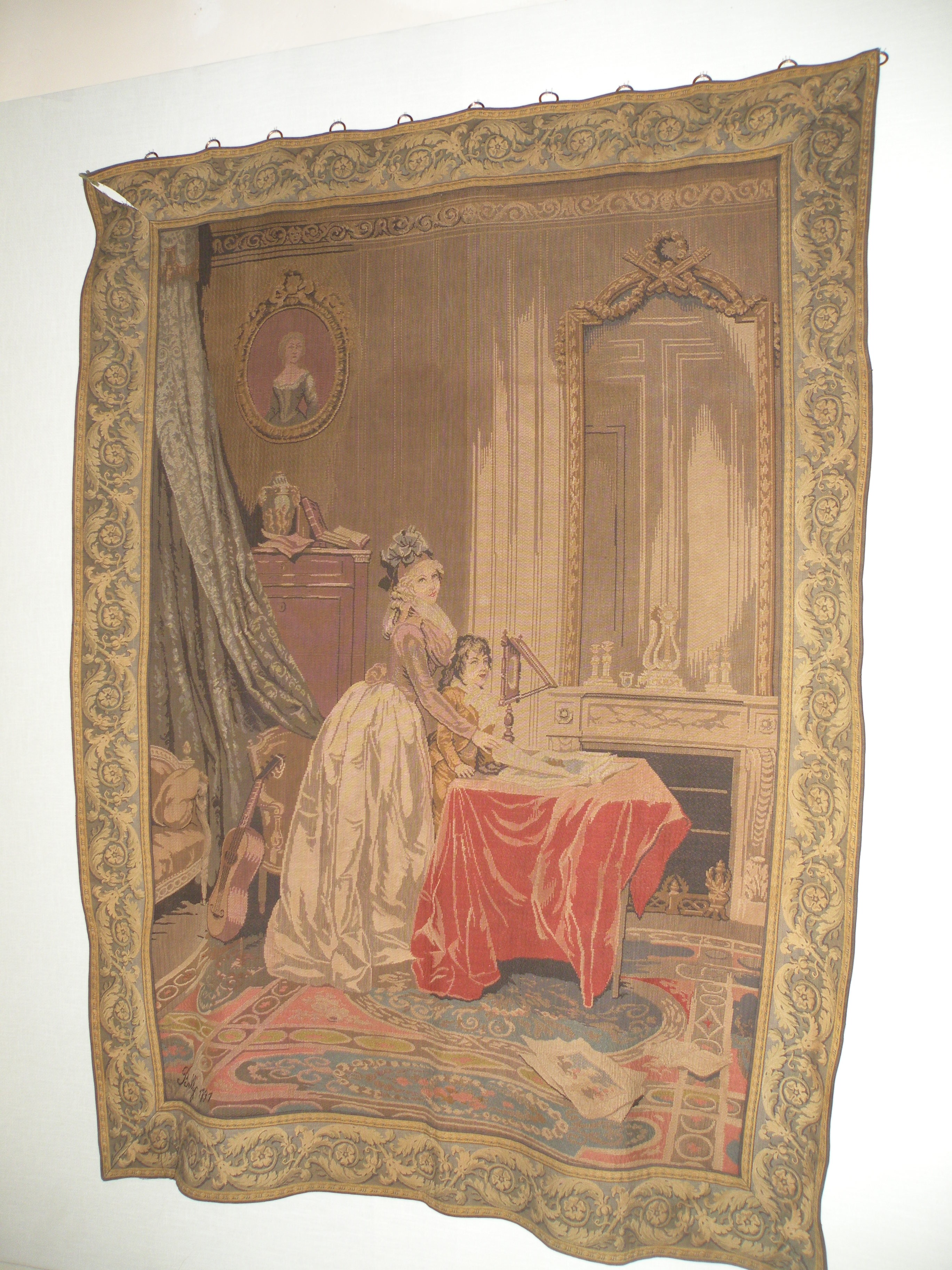 tapisserie de beauvais mme Danton et son fils utilisant un zograscope XIX s